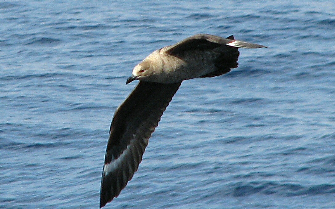 South Polar Scua, flight, 11 January 2010, Ross Sea, Antarctica